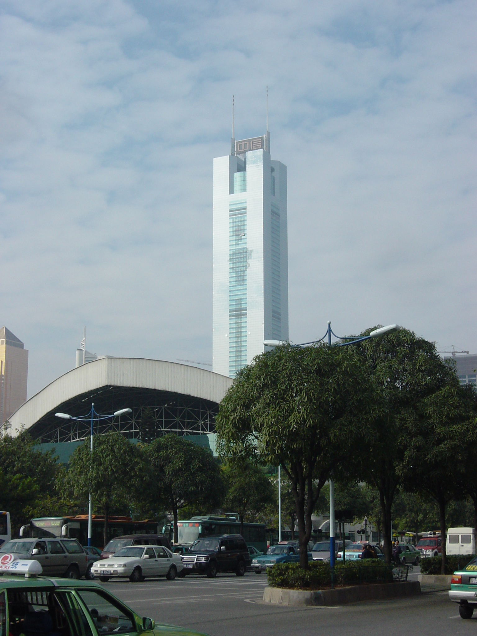 位于广州市天河北路的中信广场，本图片由上载者老火豆沙煲于2006年1月1日拍摄。